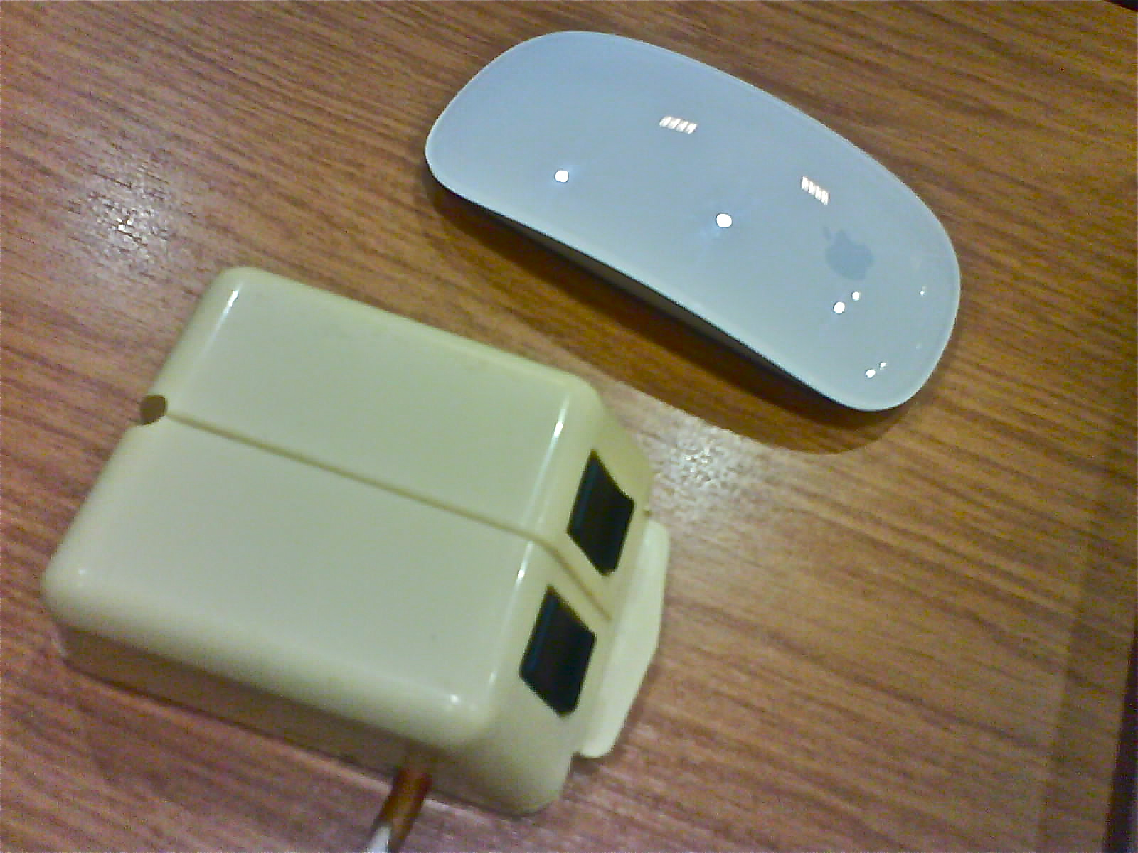 Juku hiir ja Magic Mouse